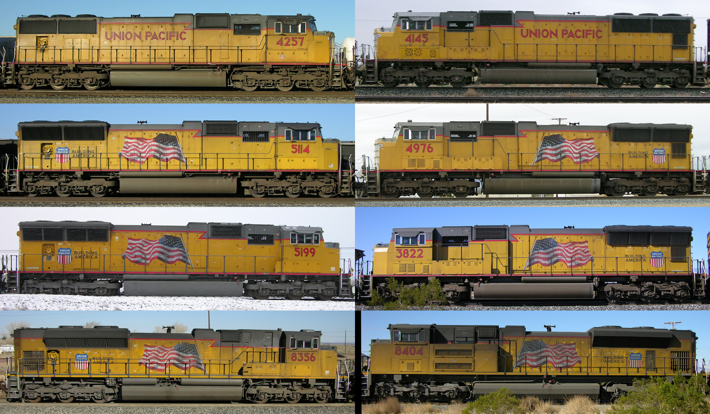 SD-70 series model change comparison